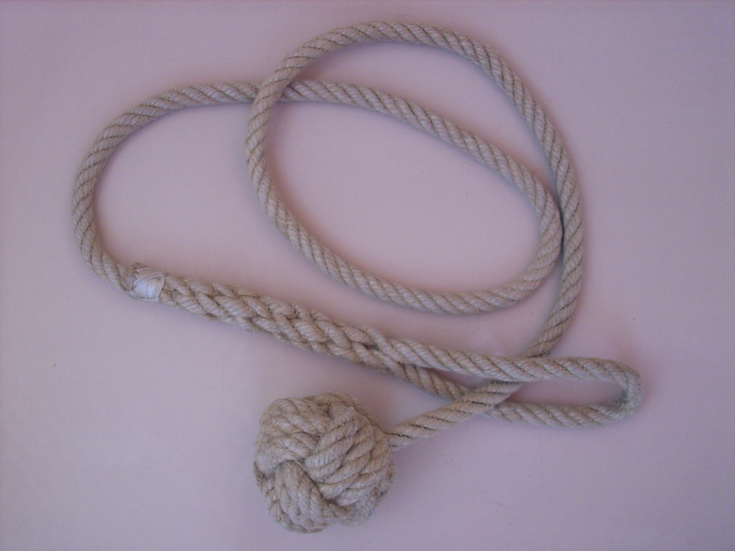 Affenfaust und gespleisstes Auge als Gürtel